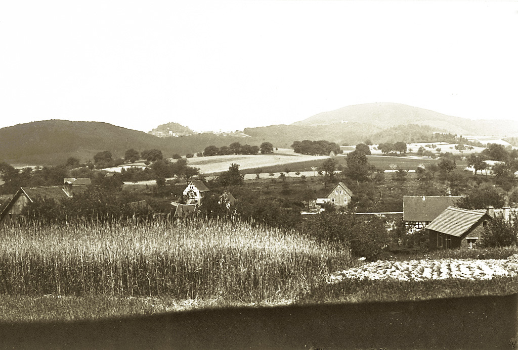 Das Dorf Krumbach im Odenwald, 1908. Im Hintergrund erkennt man Lindenfels. Heute Fürth im Odenwald, Ortsteil Krumbach